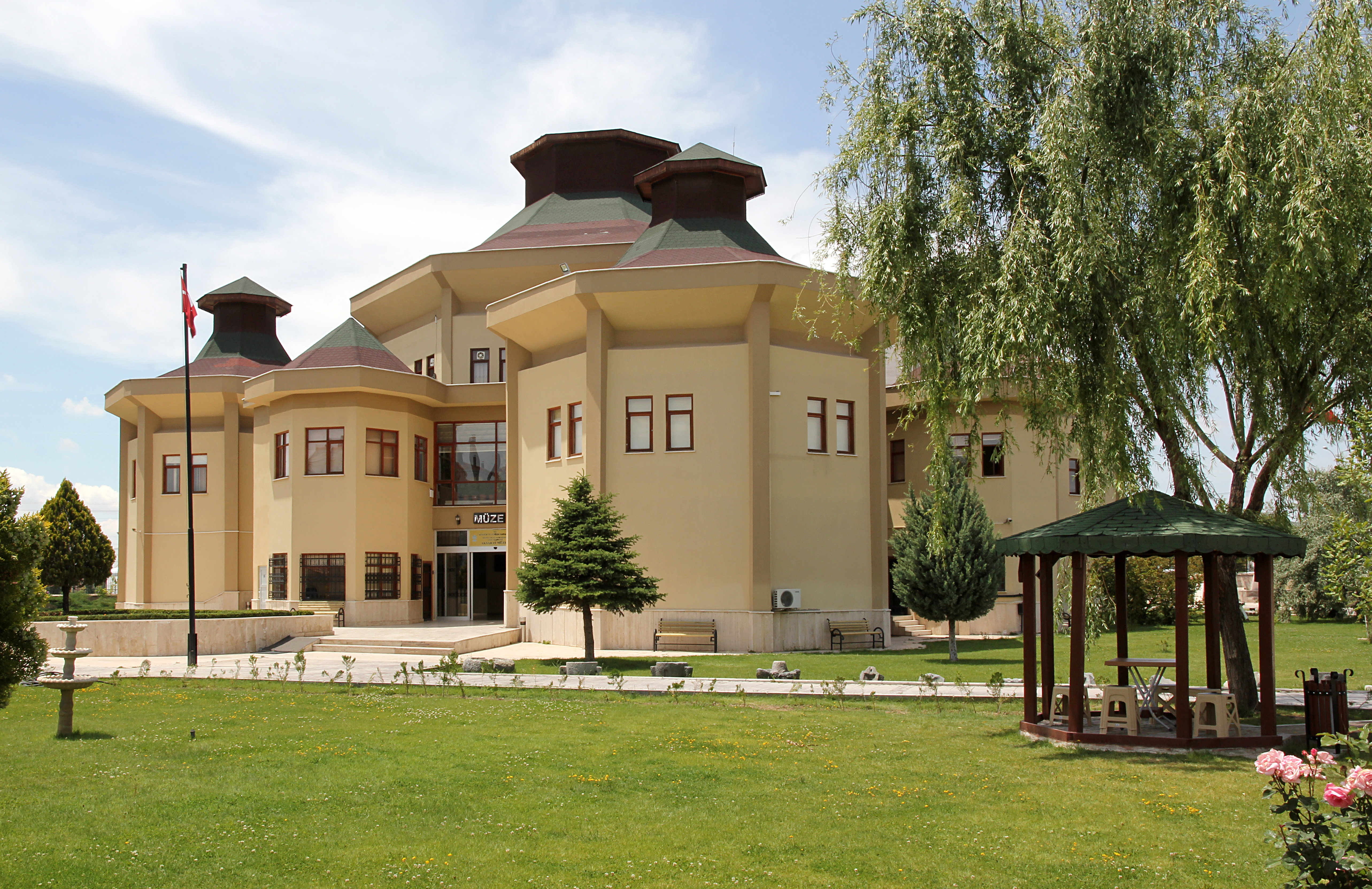 Aksaray Museum, Türkei